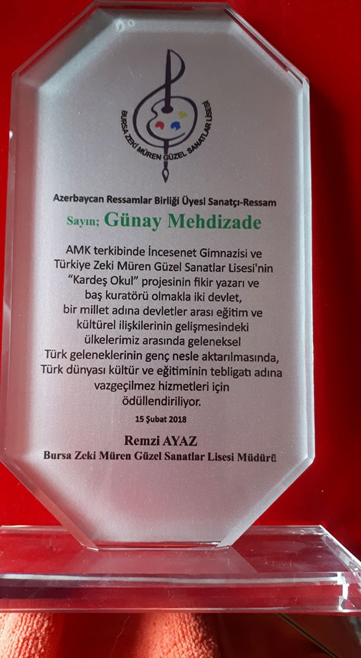 AMK tərkibində İncəsənət gimnaziyası və Türkiyə Zəki Mürən Gözəl sənətlər Litseyinin "Qardaş məktəb" layihəsinin ideya müəllifi və baş kuratoru olmaqla iki dövlət, bir millət adına dövlətlərarası təhsil və mədəni əlaqələrin inkişafındakı ölkələrimiz arasında Türk adət-ənənələrinin gənc nəslə çatdırılmasında, türk dünyası mədəniyyət və təhsilin təbliğatı adına əvəzedilməz xidmətlərinə görə mükafatlandırılmışdır. 15 fevral, 2018 Remzi Ayaz, Bursa Zeki Müren Güzel Sanatlar Lisesi Müdürü.